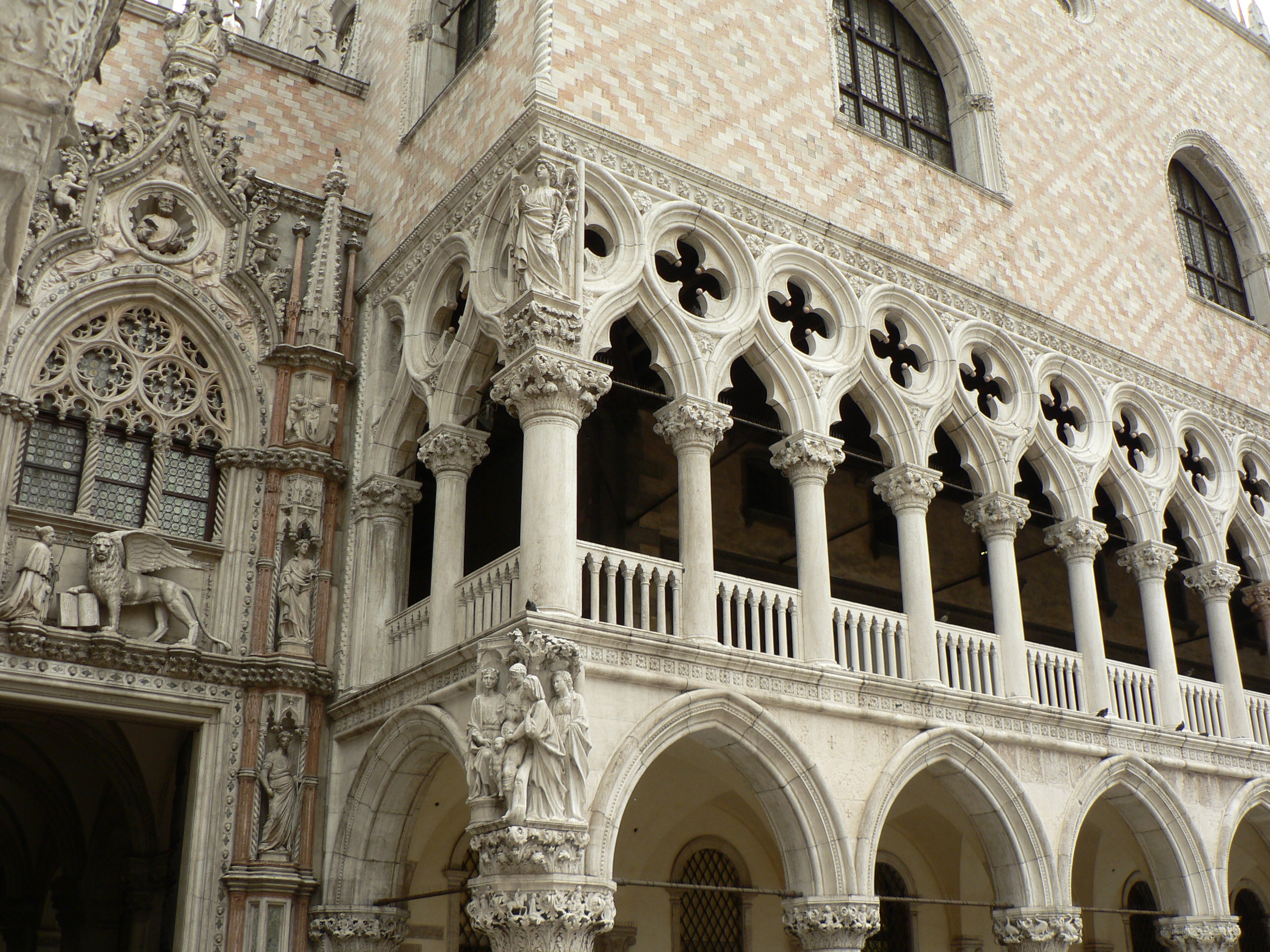 Venise (Italie), le palais des Doges